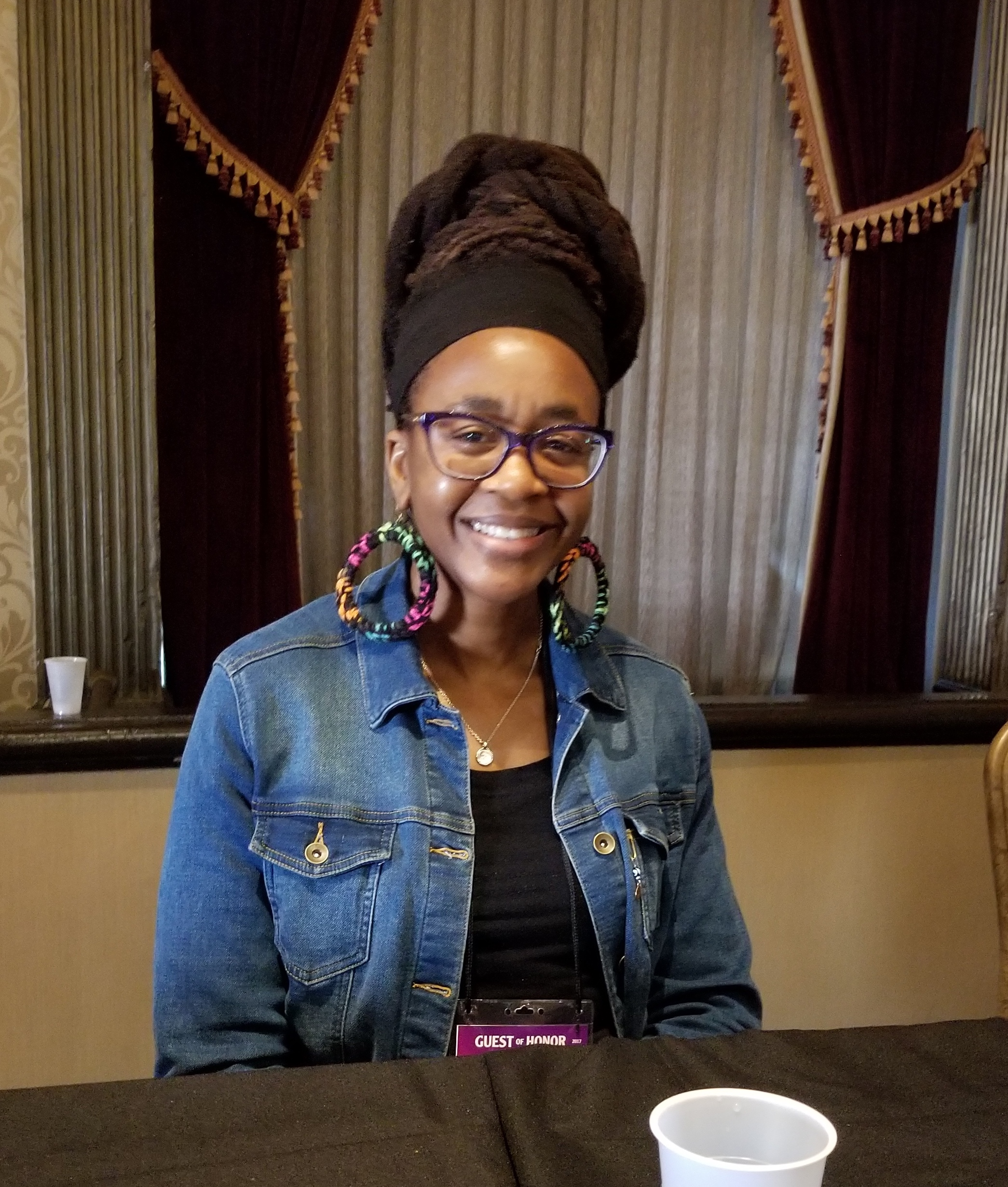 After a Necronomicon 2017 panel.